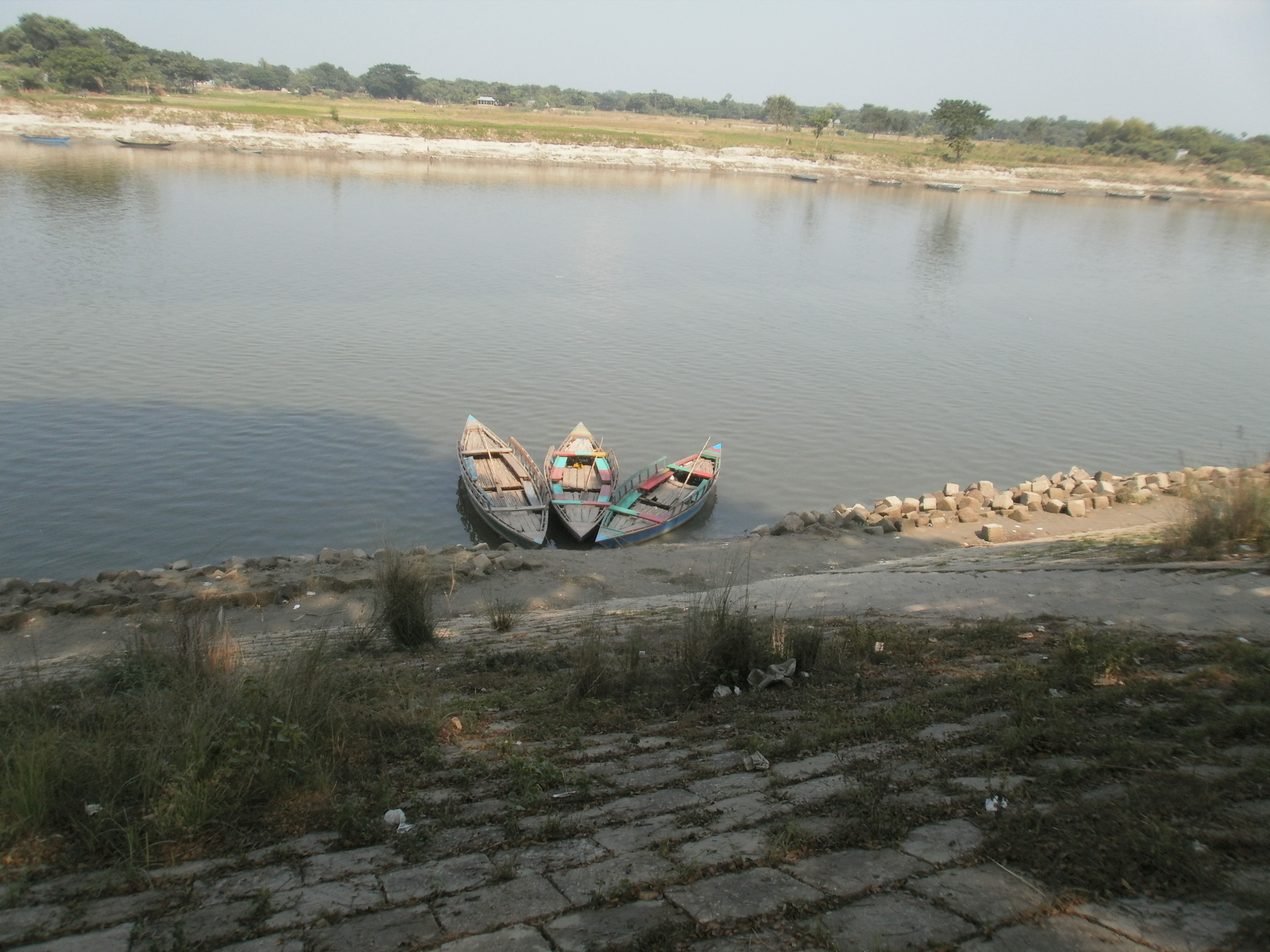 ডিঙ্গি নৌকাঃ ব্রহ্মপুত্র নদের তীরে ঘাটে বাঁধা, ময়মনসিংহ, ২০১১